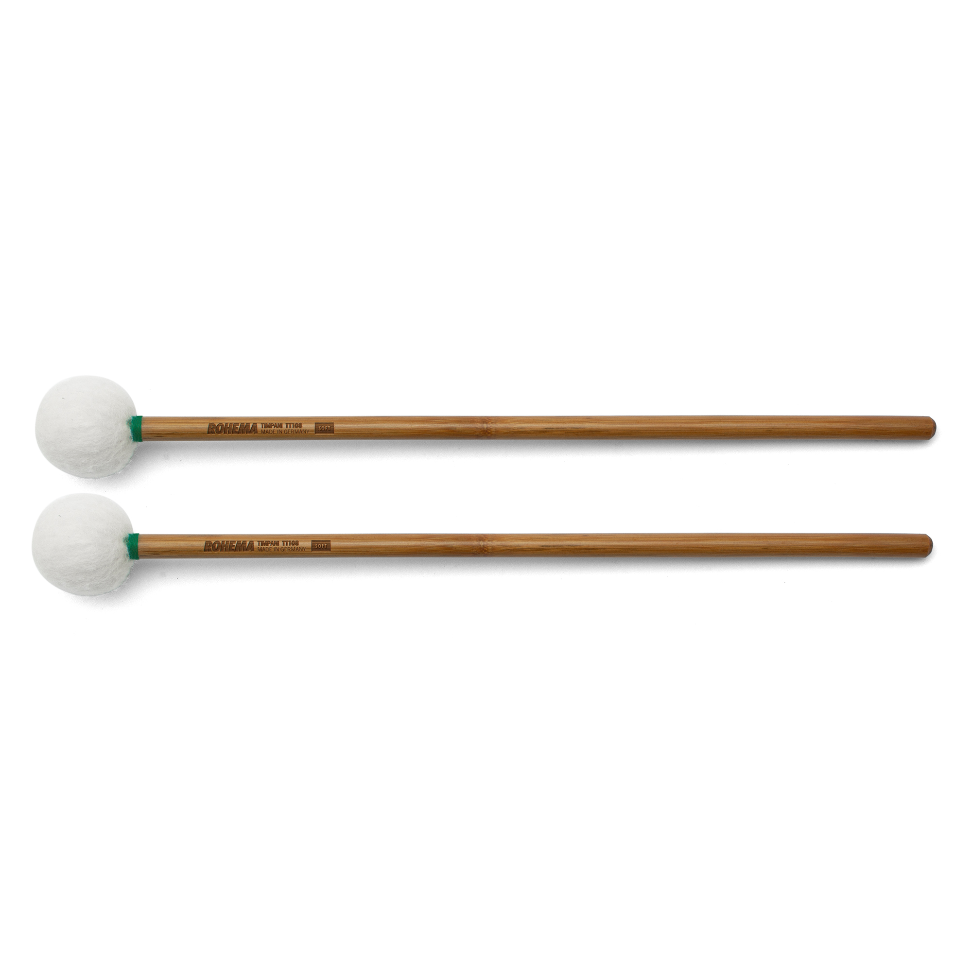 Timpani Mallet Tonkin